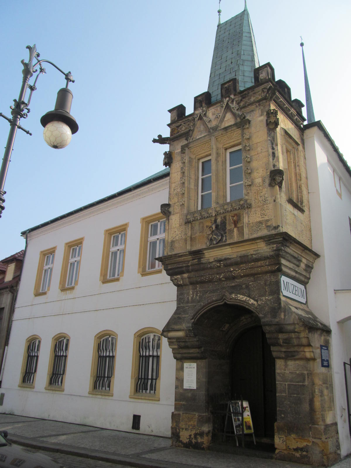 Městský dům (Louny), Pivovarská 18, Louny